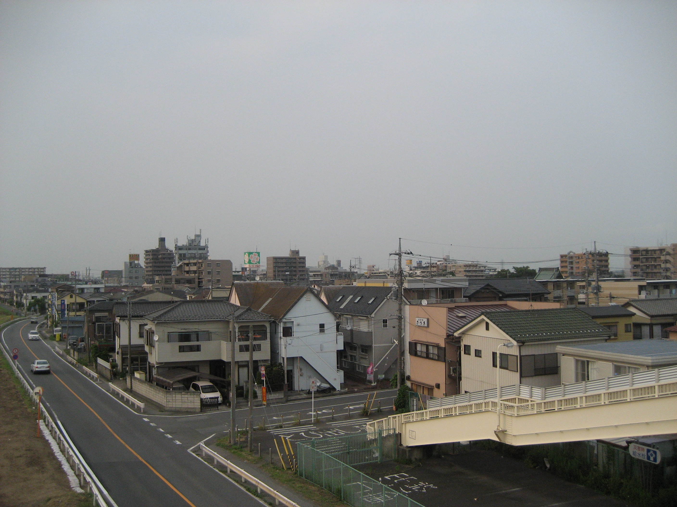 吉川市中心部